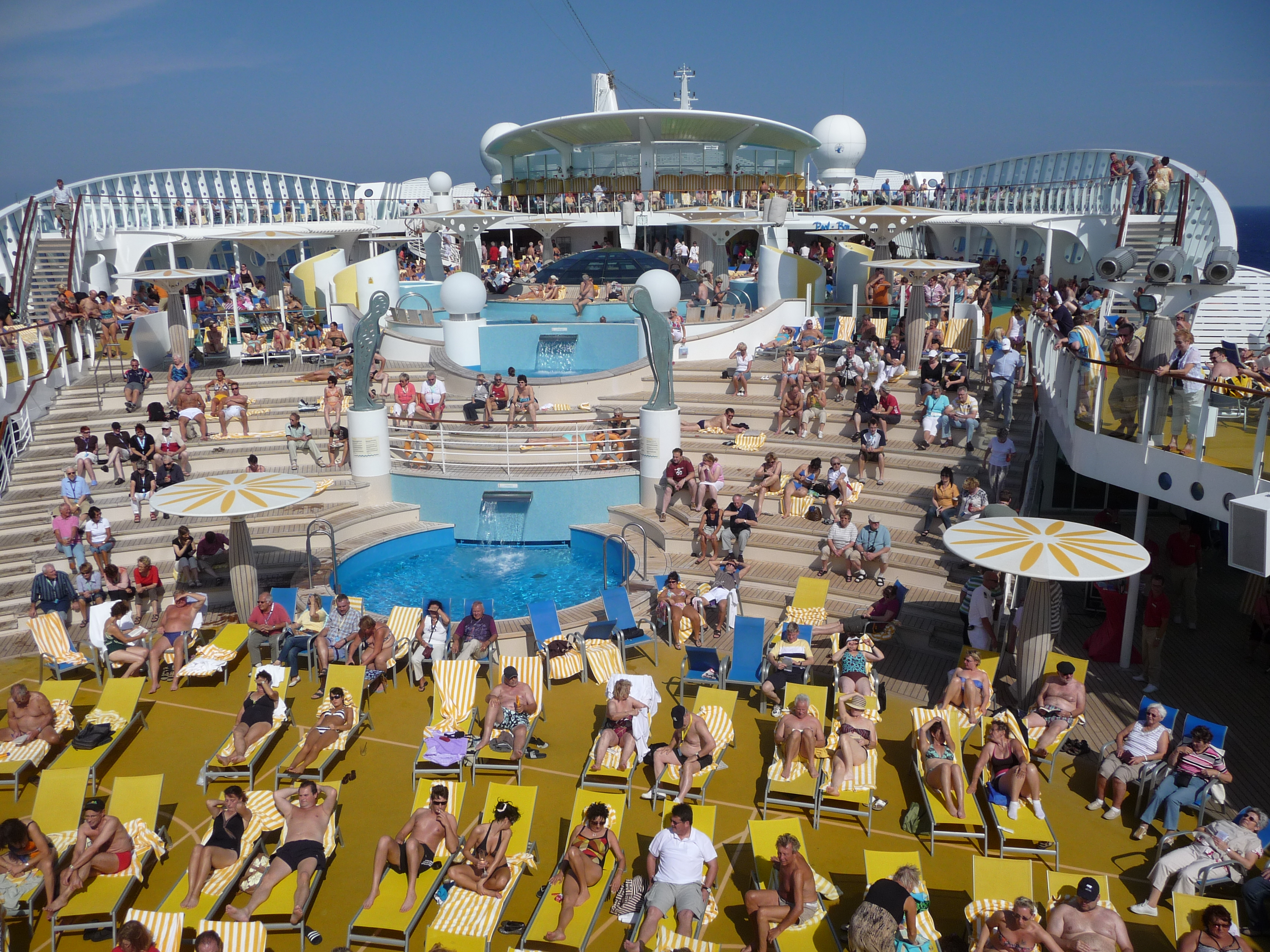 Sonnendeck